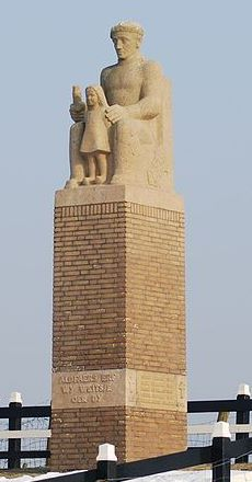 Oorlogsmonument Soensterdijk